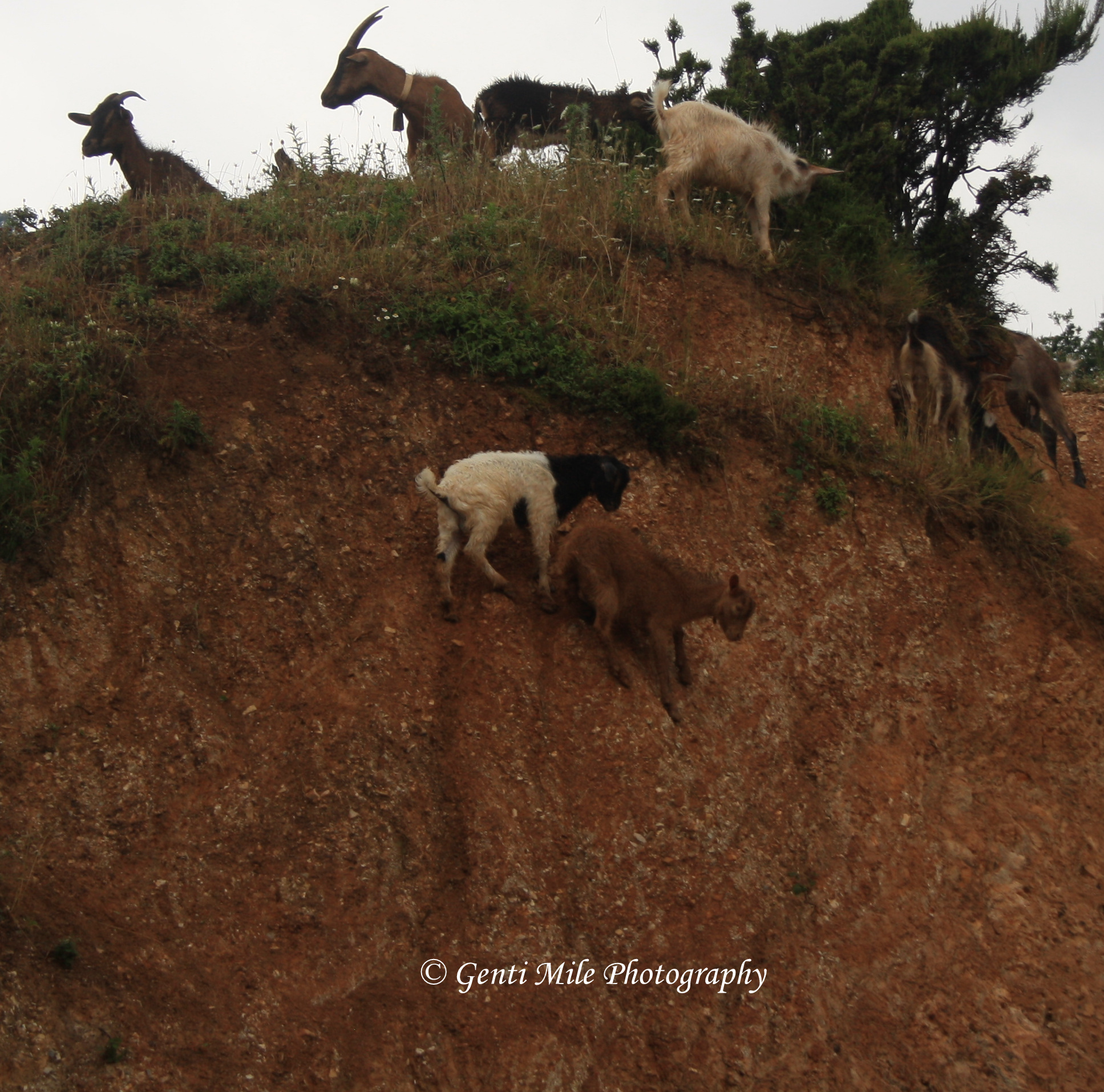 BioMonumente Nr., Shqiperi